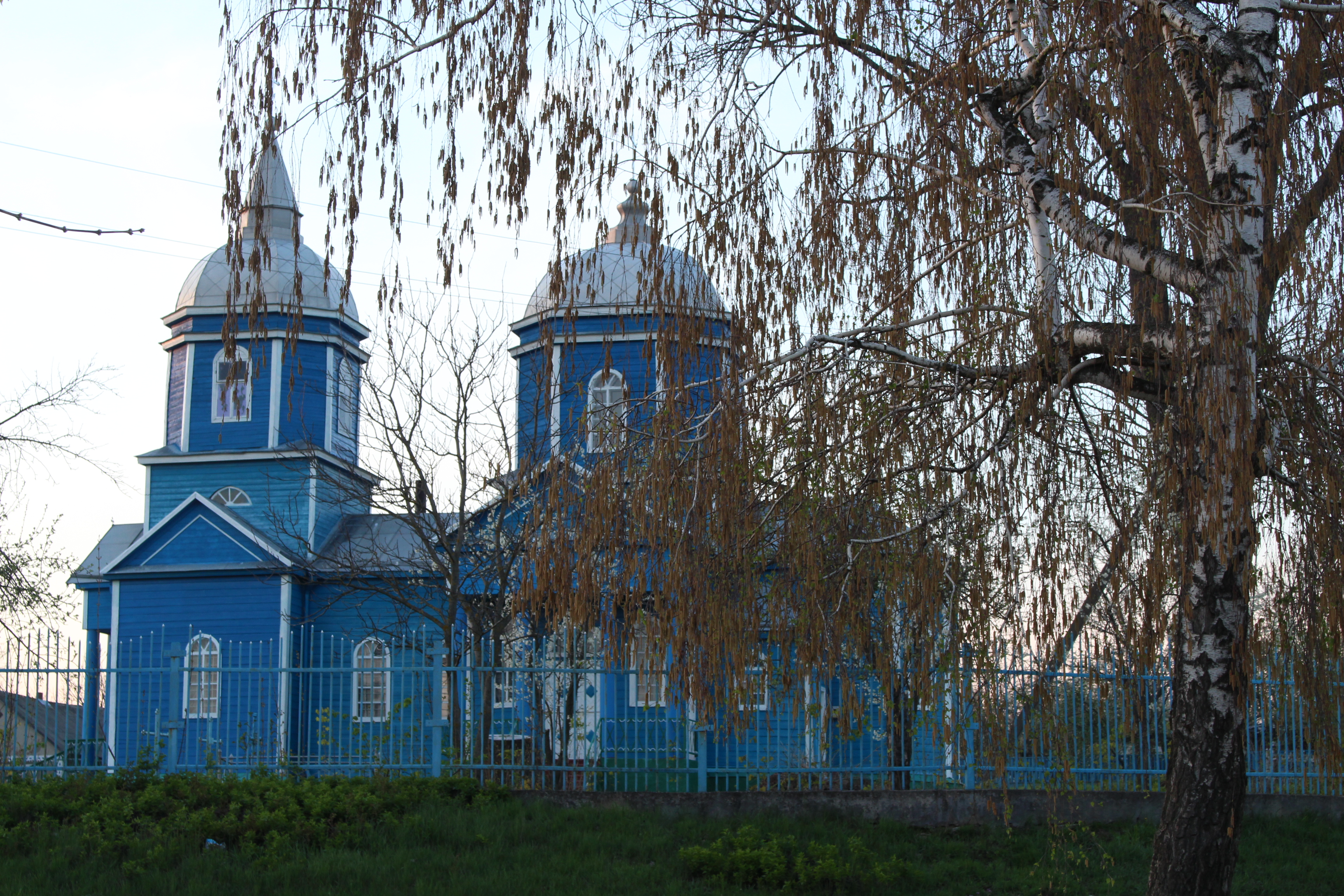 Церква Покрова Богородиці (дер.), с. Летичівка, вул. Шкільна, 3